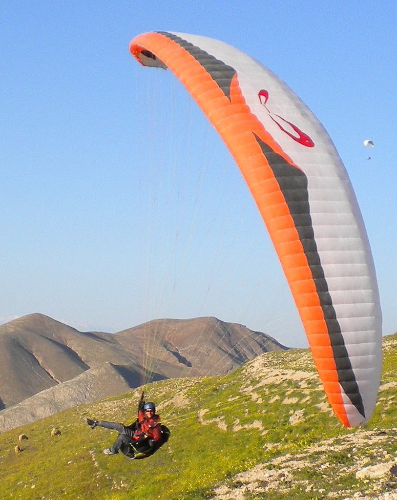 Parapente en Haute-Provence